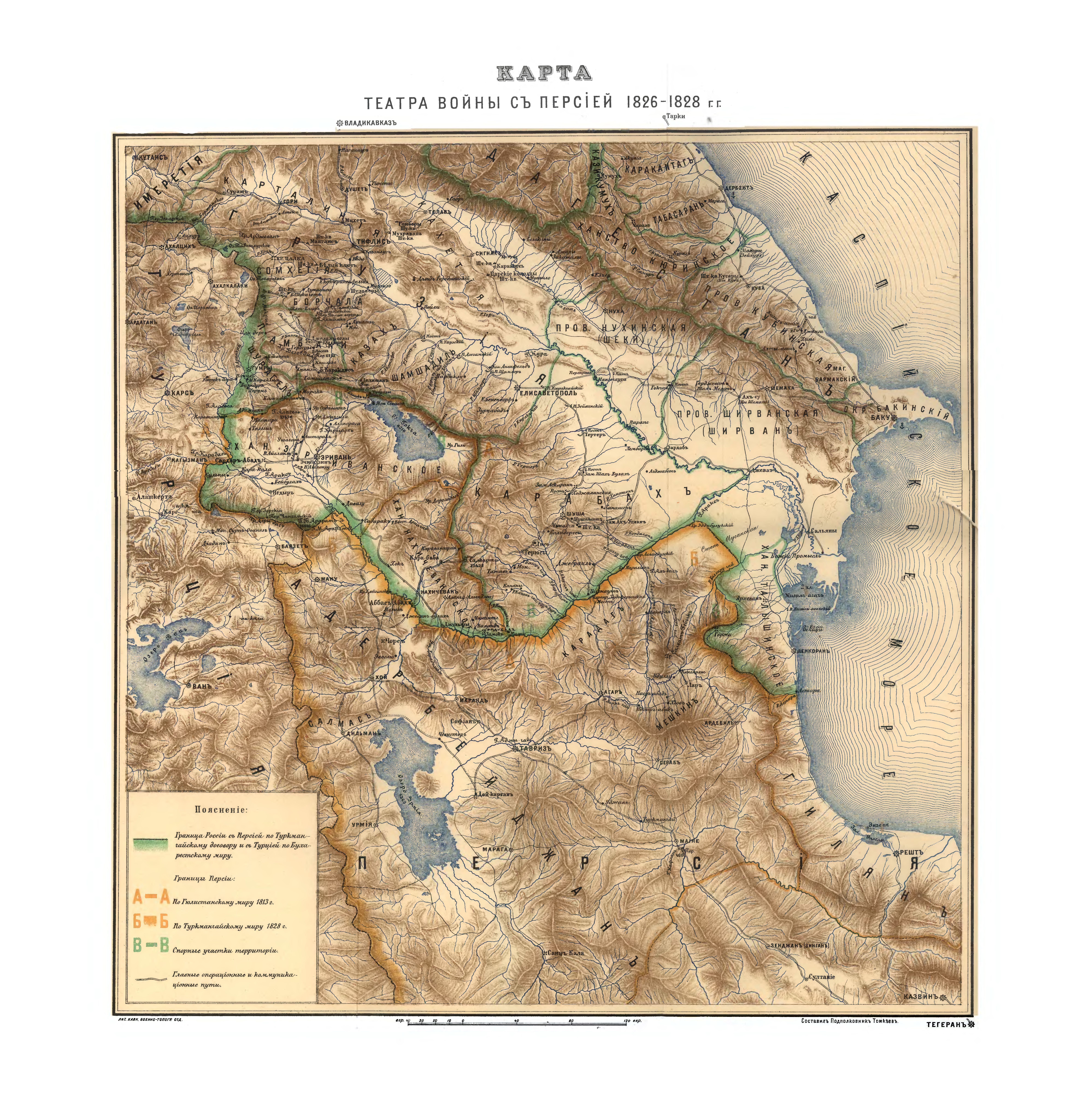 Cənubi Qafqaz 1826-1828-ci illərdə (xəritə)